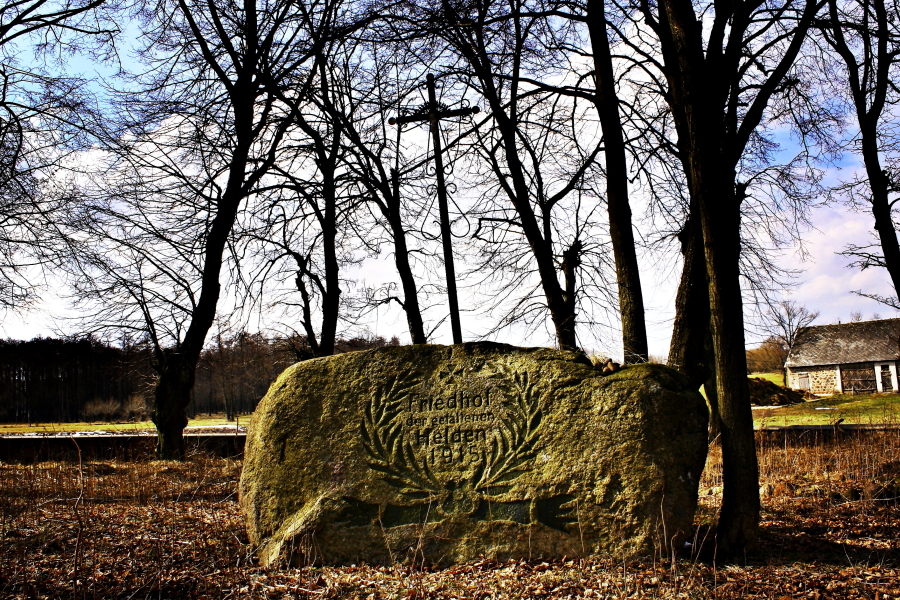 Cmentarz wojenny z I wojny światowej Supy, Przytuły 02.1987.